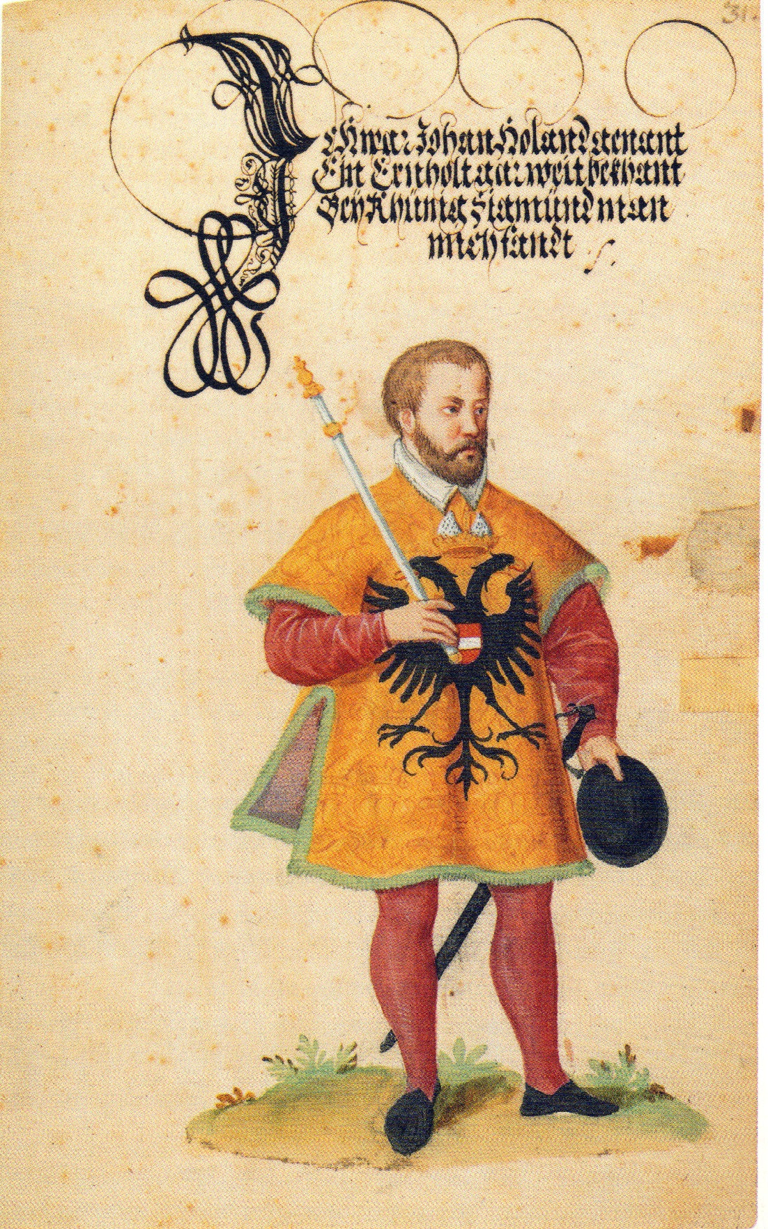 Herold Johann Holland, SB München, Cgm 9220, S. 31